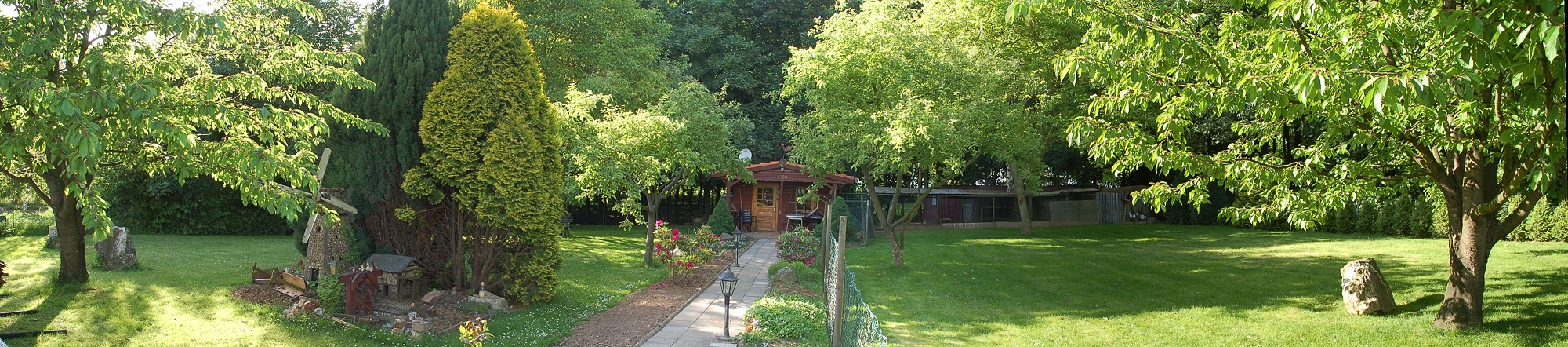 Die Geflügelfarm Engels in Evinghoven